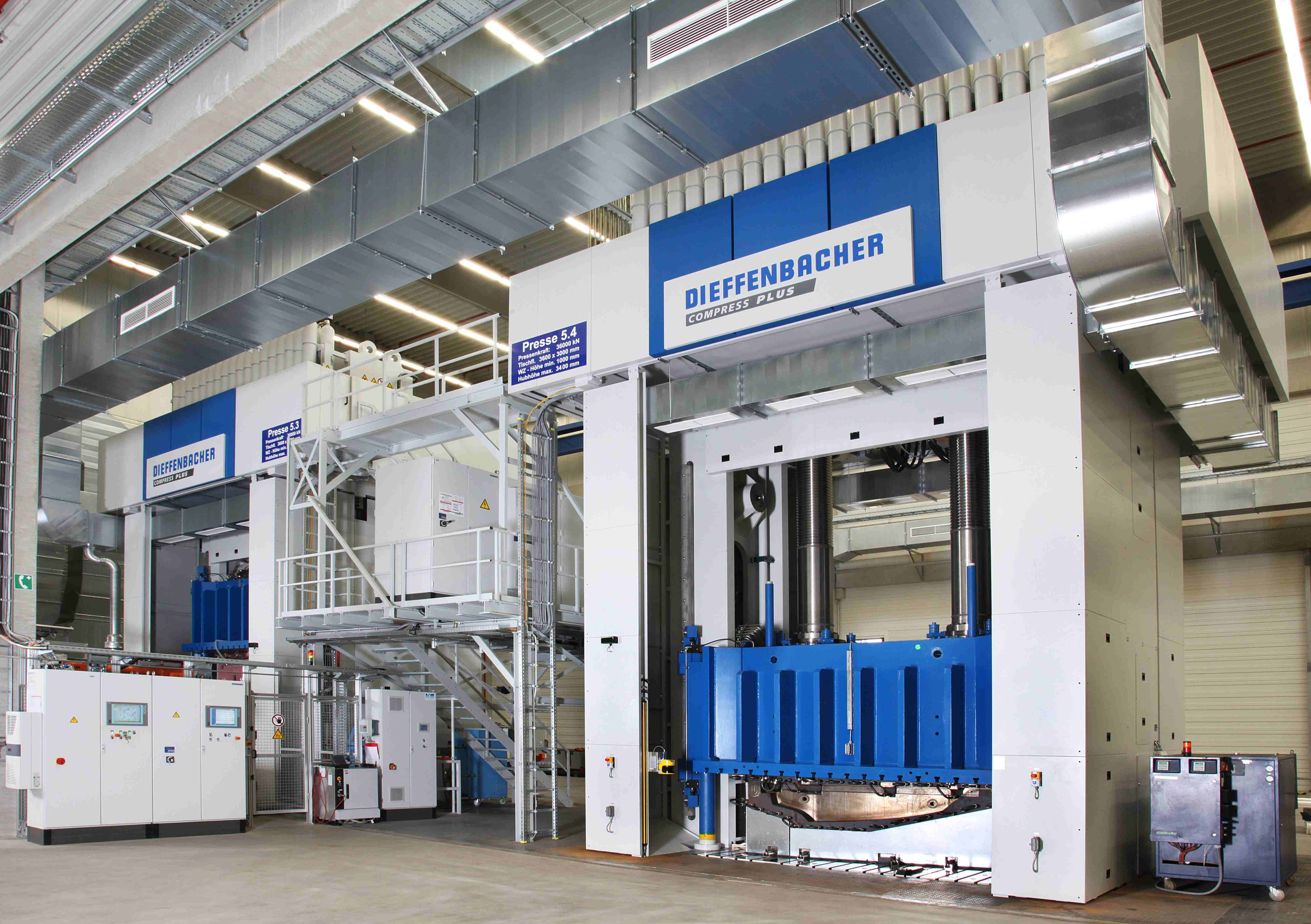 Kunststoffpresse